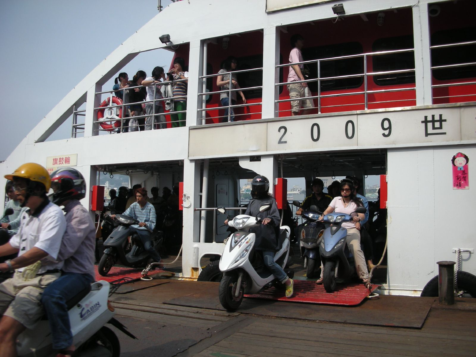 高雄市輪船公司旗鼓輪靠港，下層機車陸續駛出。